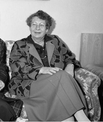 Nell J. Ginjaar-Maas, staatssecretaris van Onderwijs en Wetenschappen (Dutch state secretary of Education and Science)